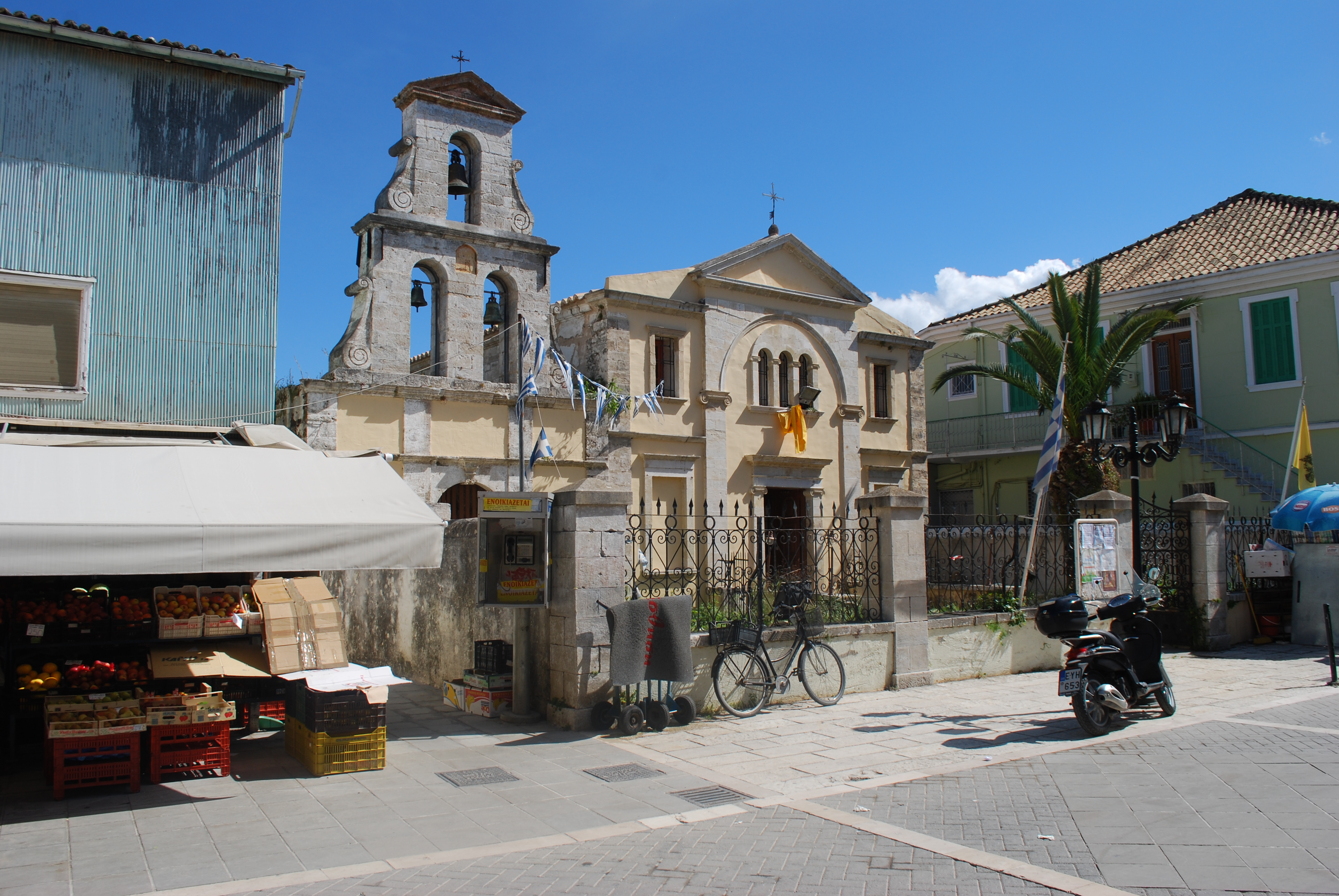 Vue de Lefkada.